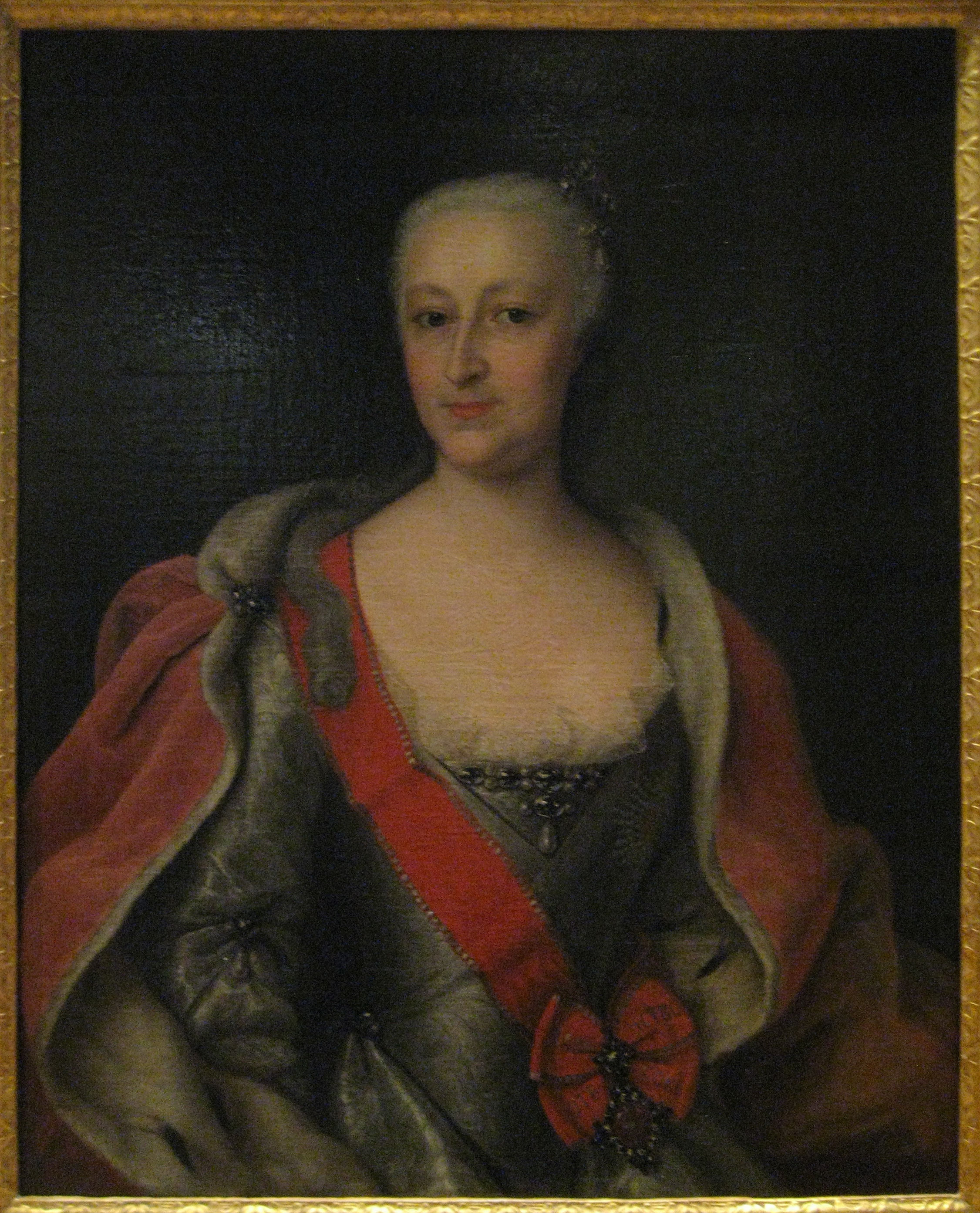 ПОртрет А.И. Гессен-Гомбургской